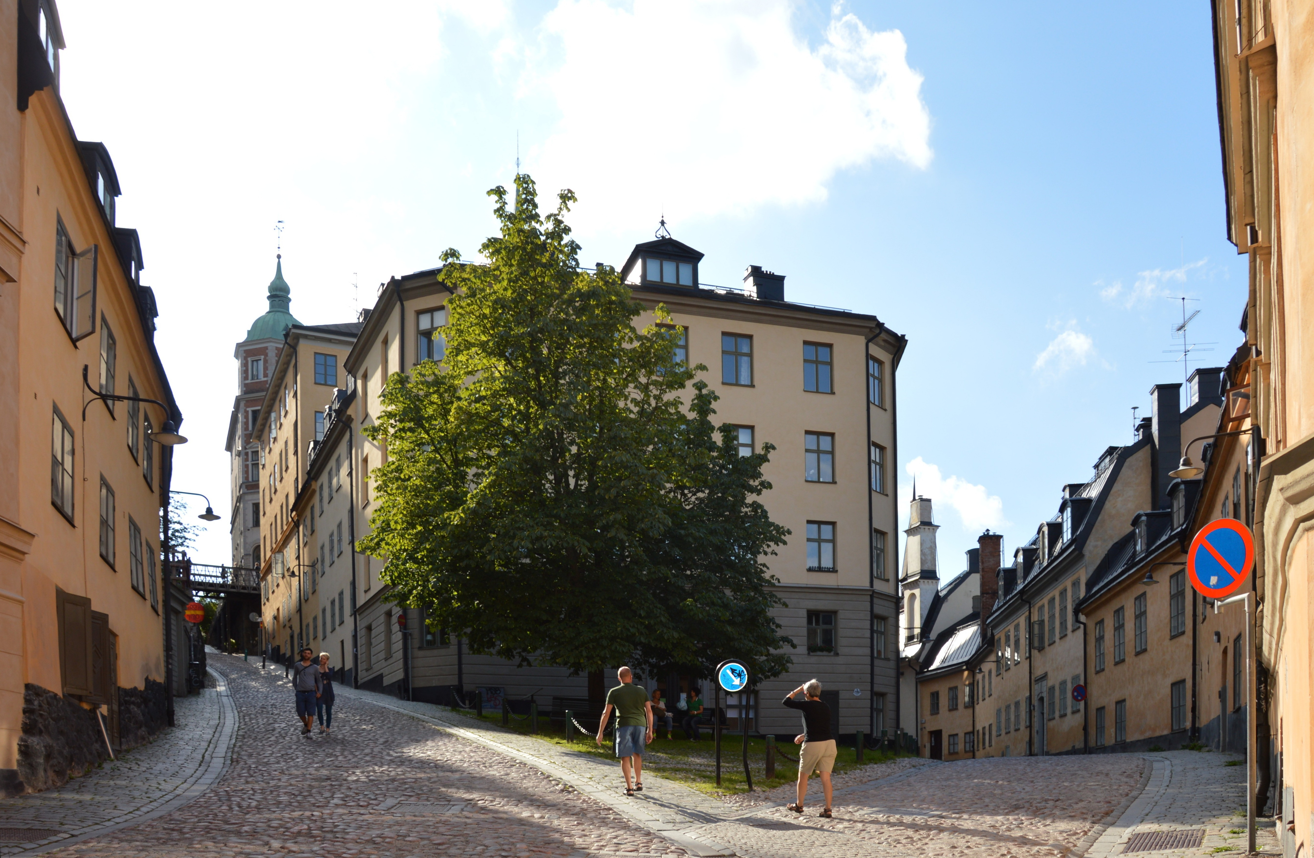 Mariaberget